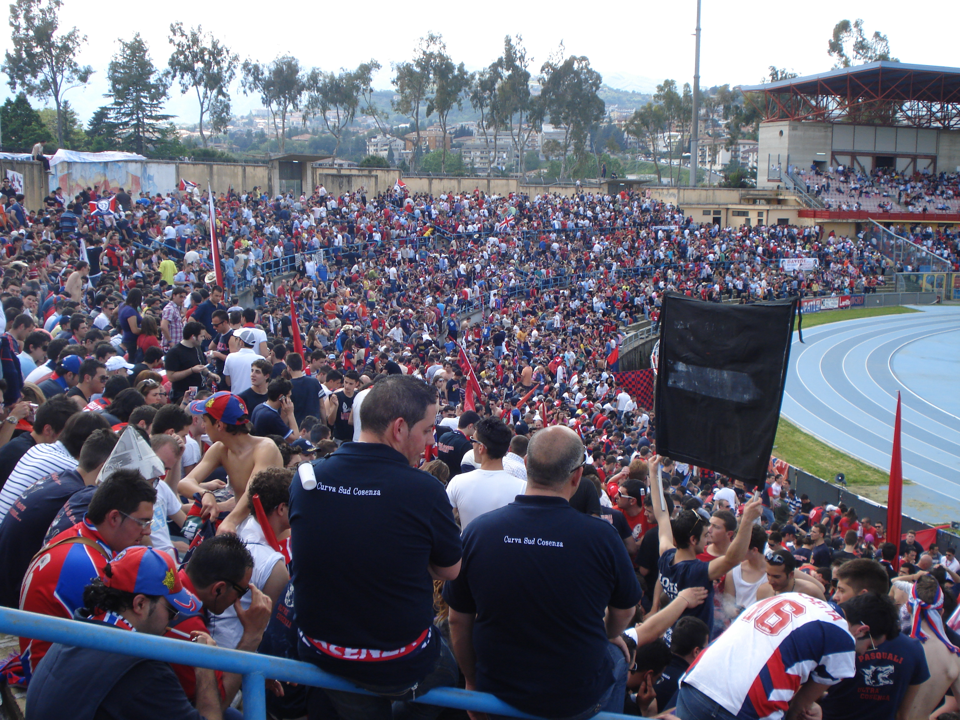 Curva sud Bergamini dello stadio San Vito di Cosenza in una partita del Cosenza Calcio 1914 nel campionato di Lega Pro Seconda divisione 2008-2009